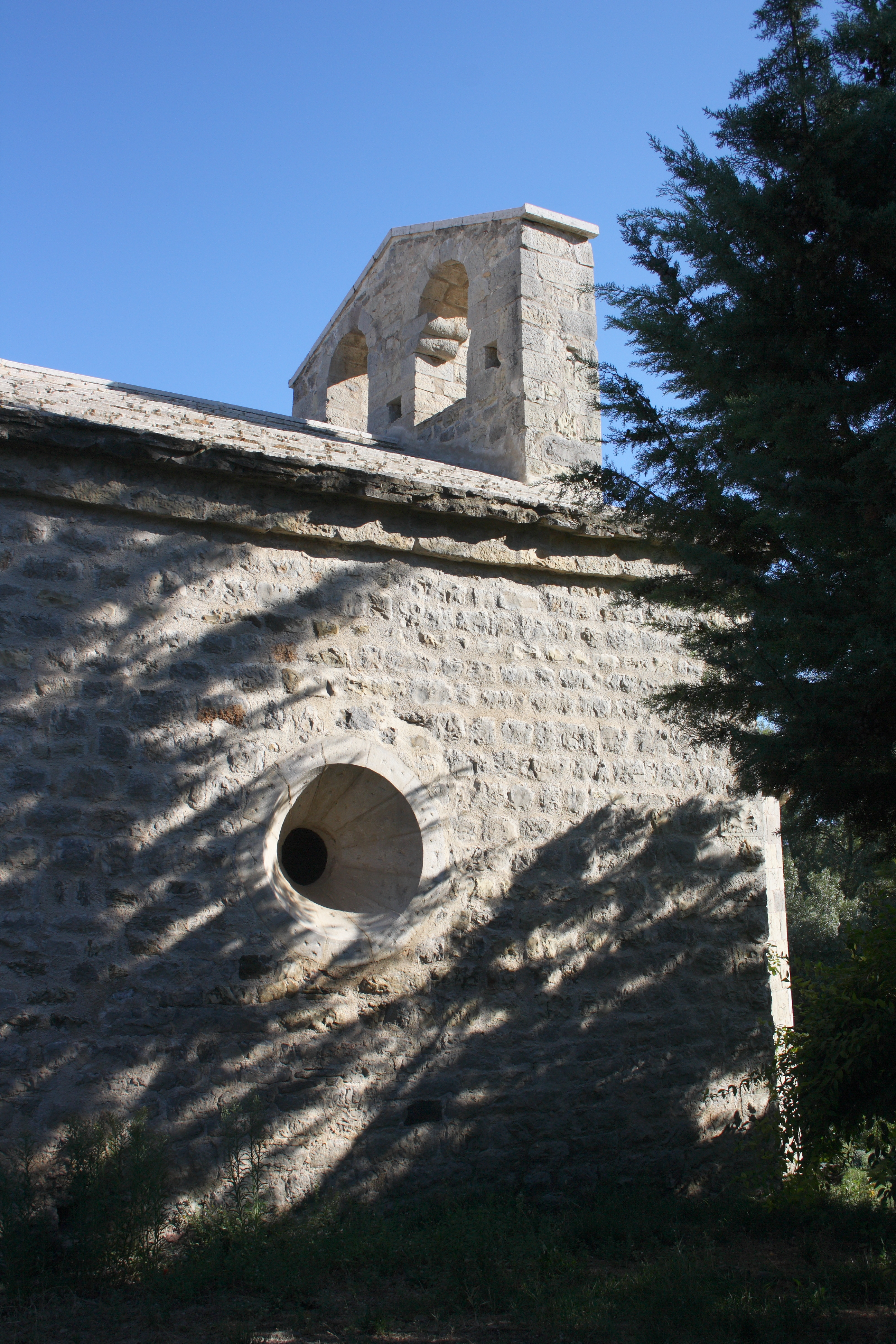 Chapelle Notre-Dame de Bethléem, ehemalige Kapelle einer Templerkommende in Bras (Var), einer Gemeinde im Département Var in der französischen Region Provence-Alpes-Côte d'Azur, aus dem 13. Jh., Südseite mit Okulus, offener Glockenturm